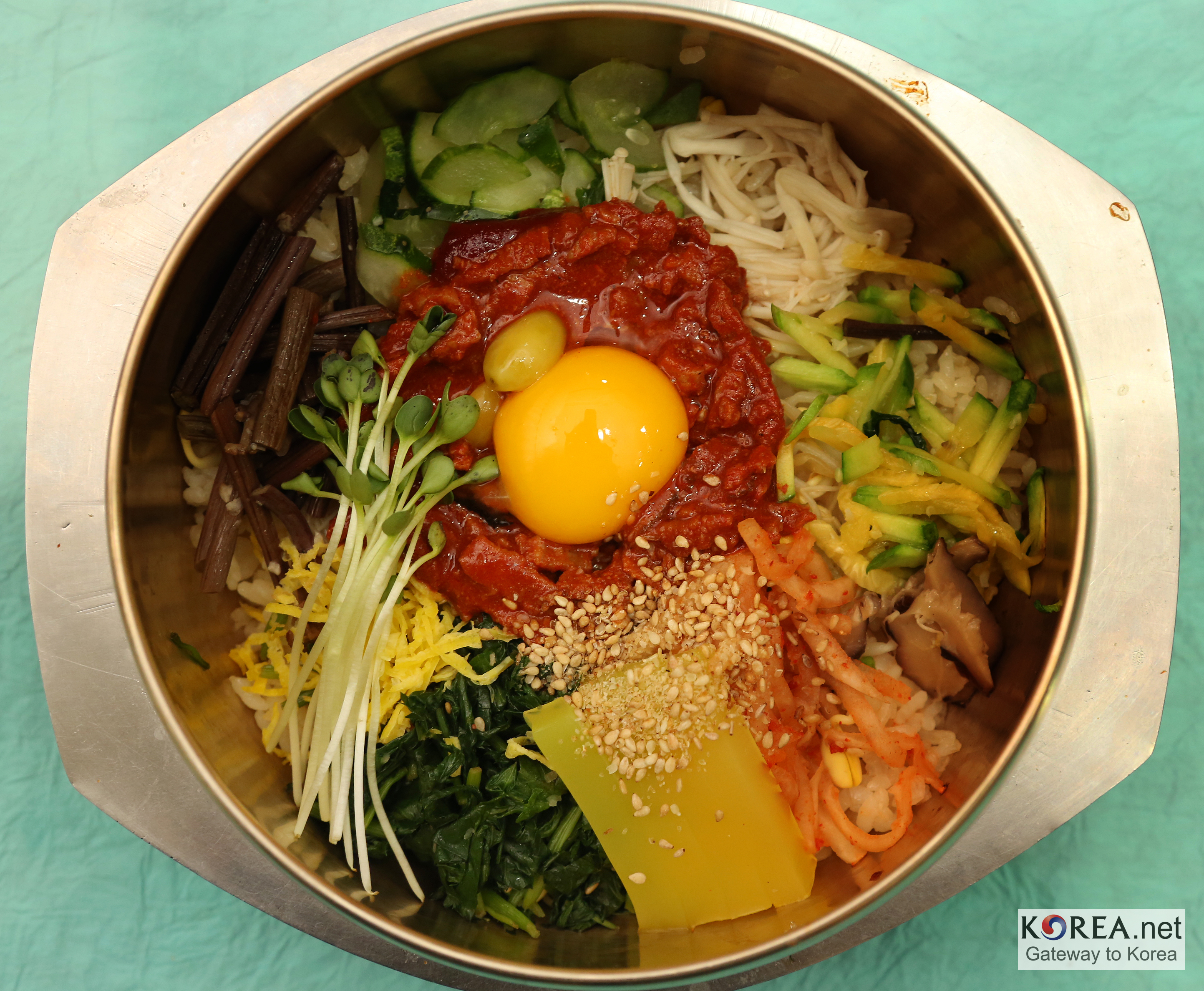 Bibimbap